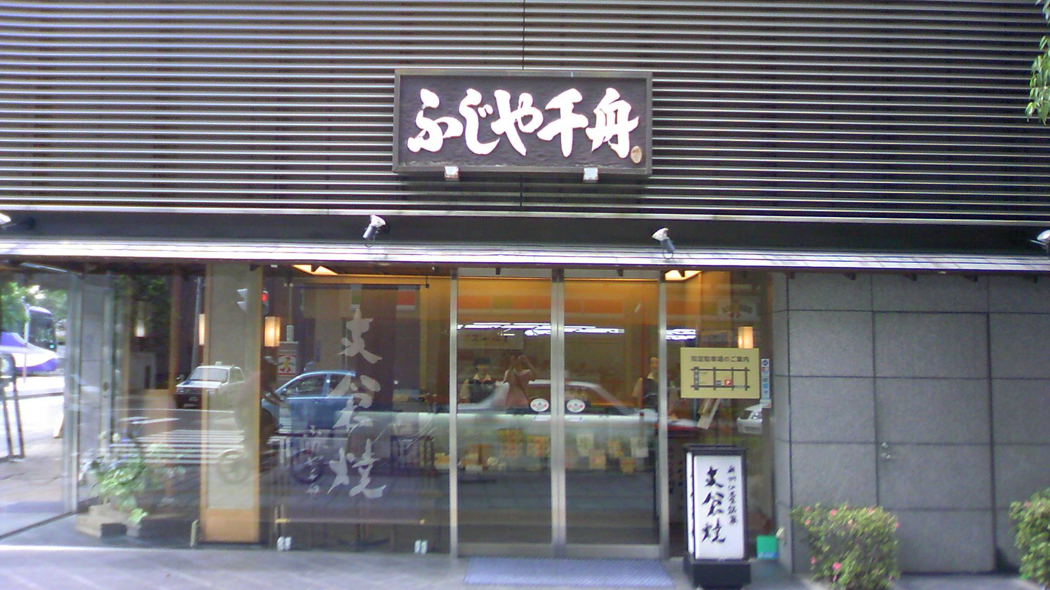 ふじや千舟本店